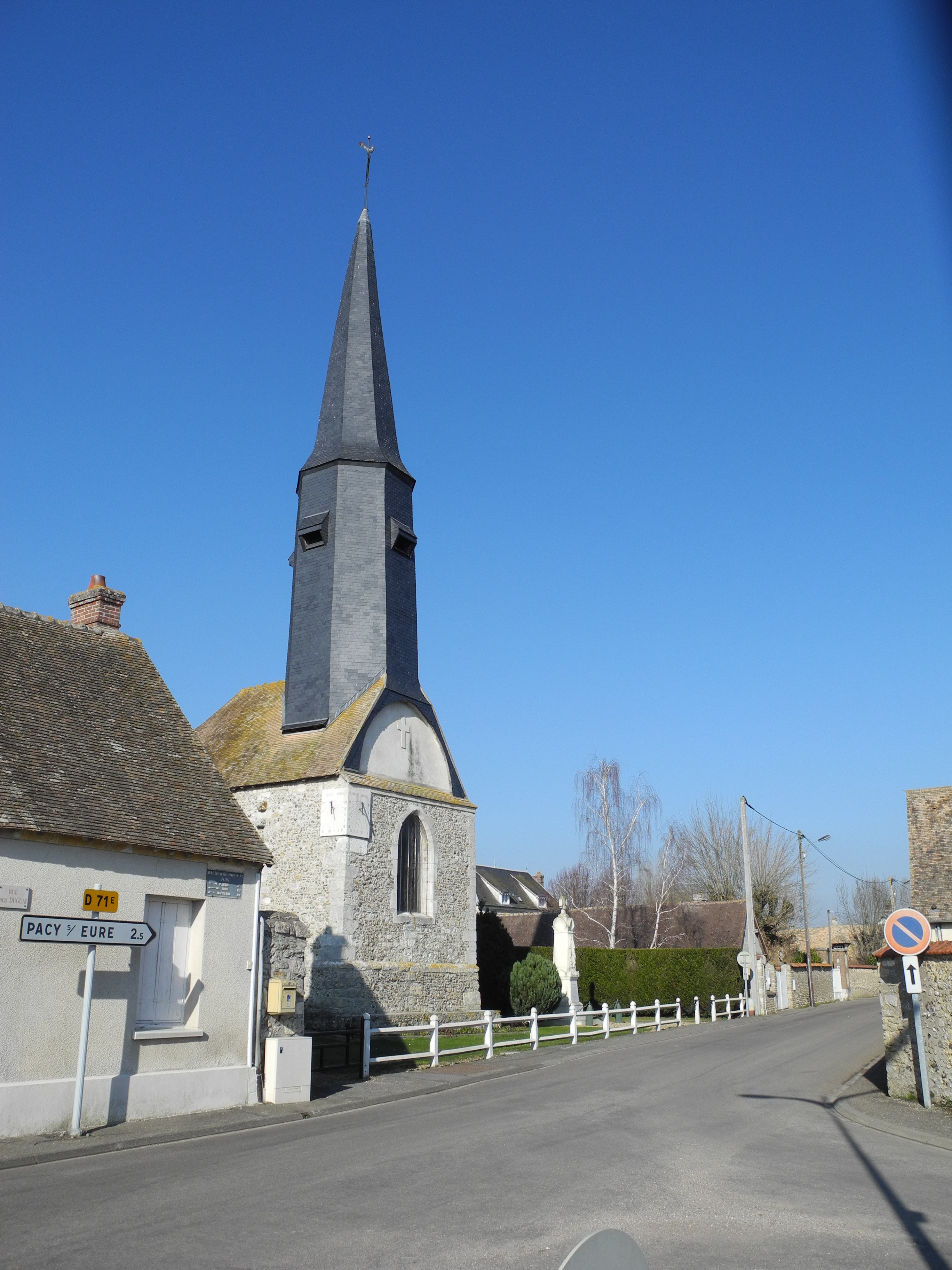 L'église de Fains (Eure)